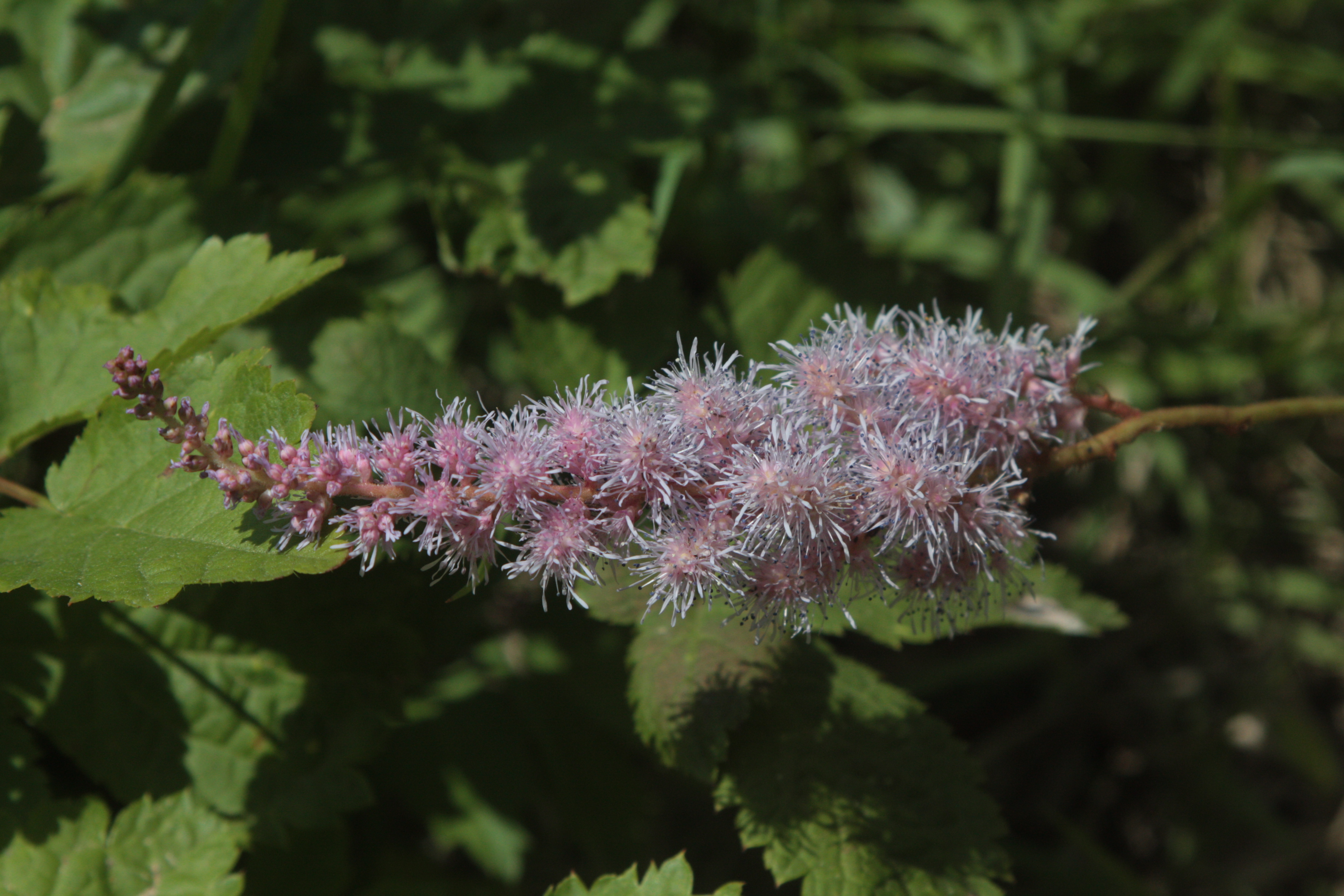 Astilbe rubra in Bupyung, Korea